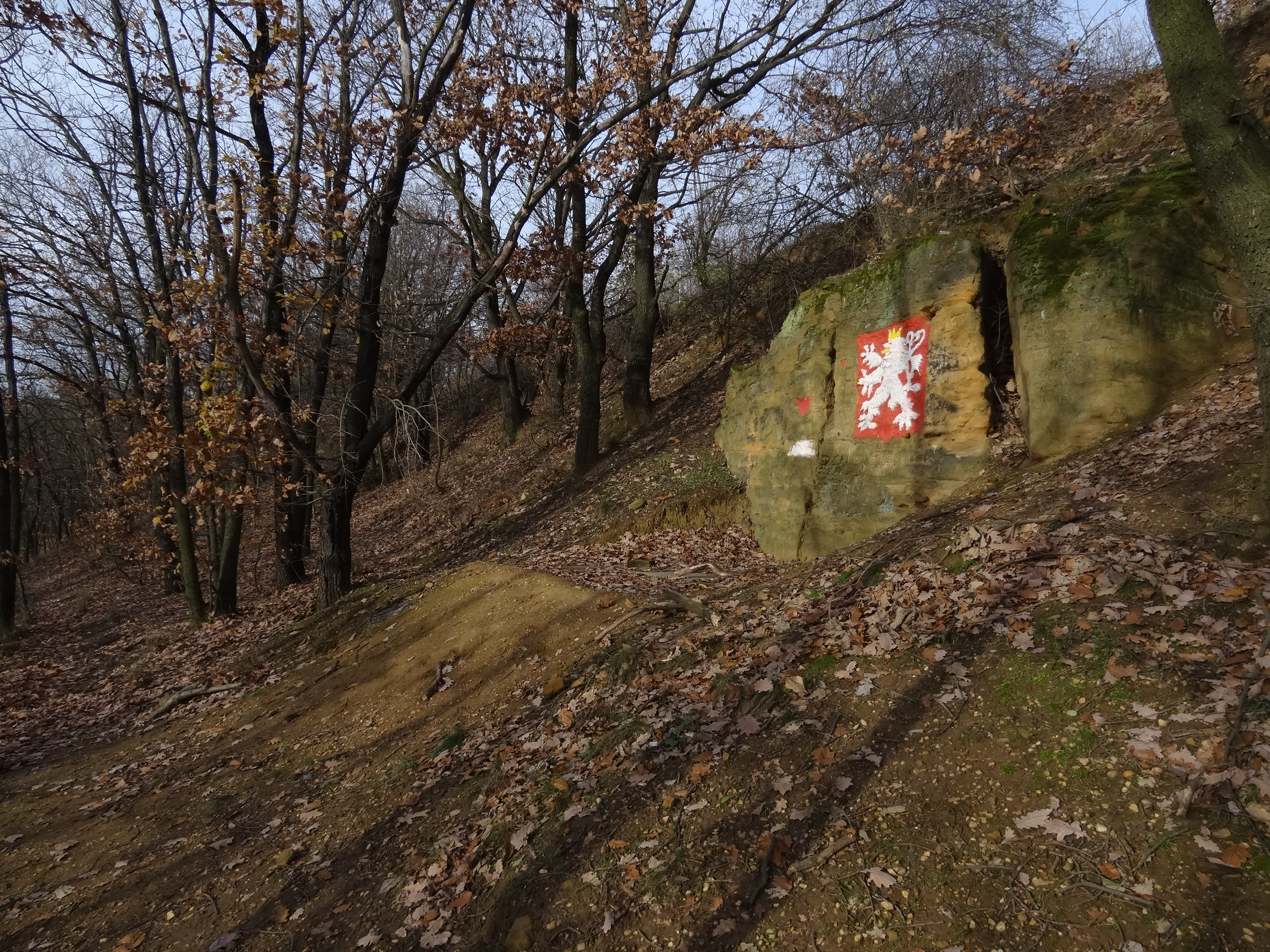 PP Okrouhlík - skalky v severní části chráněného území